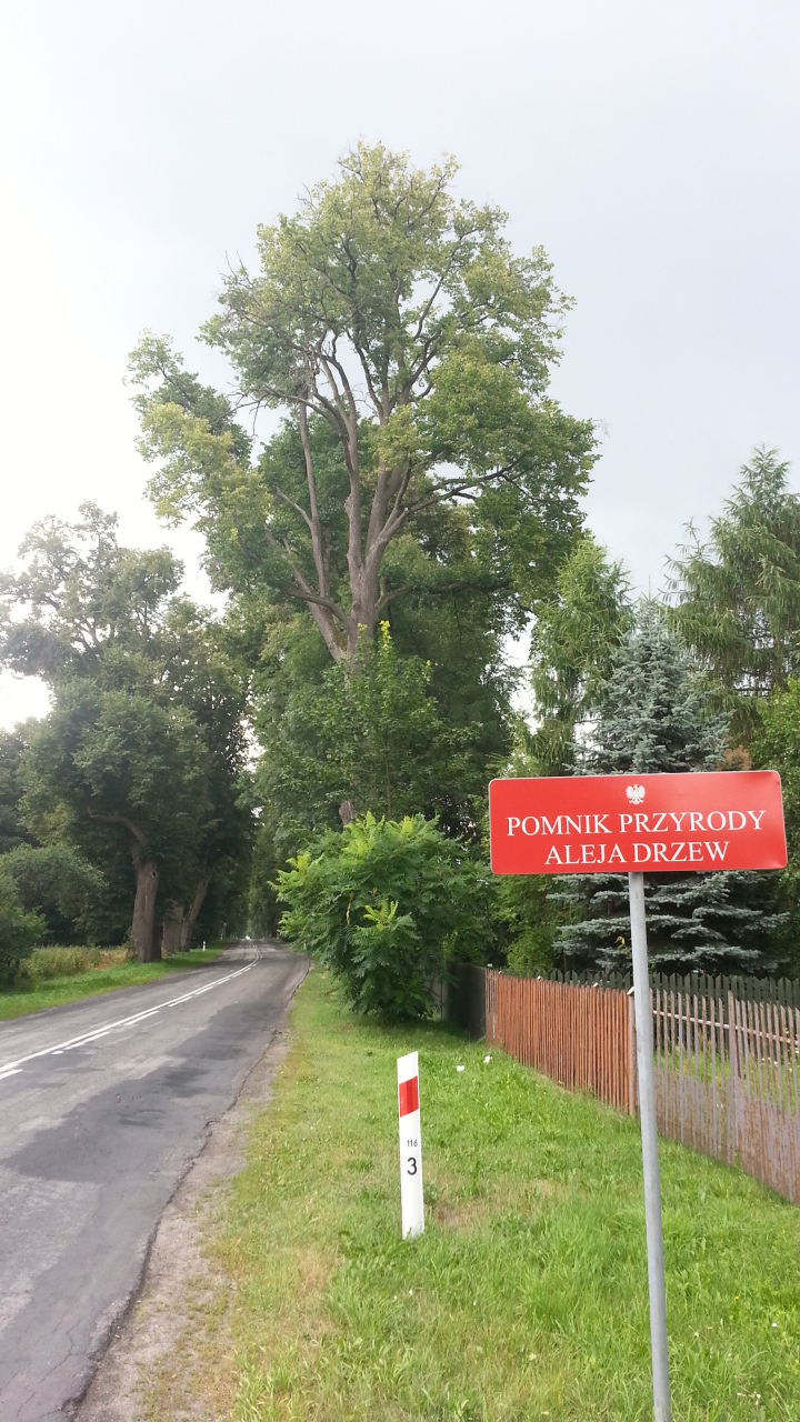 Pomnik przyrody Aleja Drzew Sewerynów - Brzóza (gmina Głowaczów), widok w kierunku Brzózy.